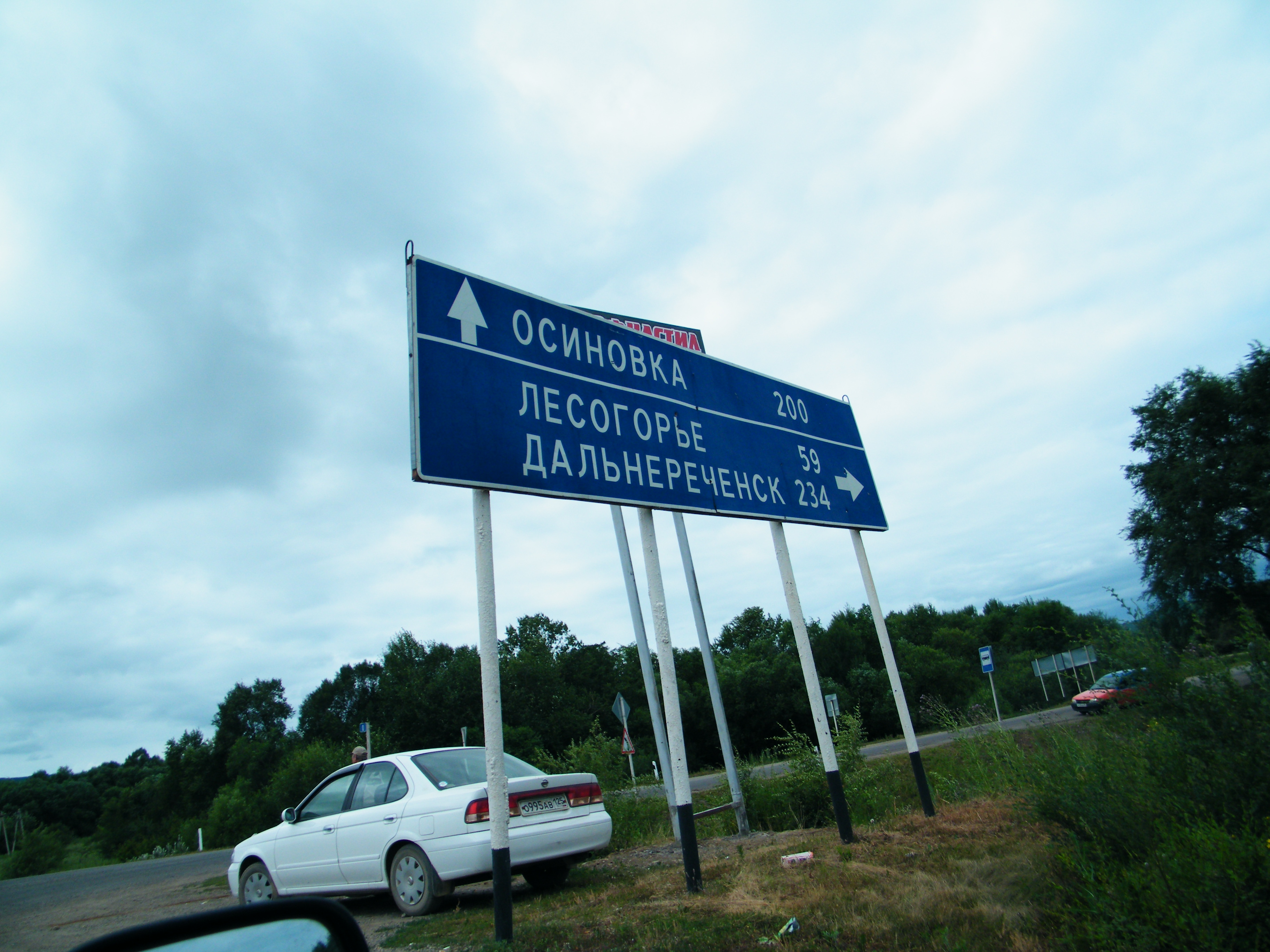 Перекресток трассы Восток и А181